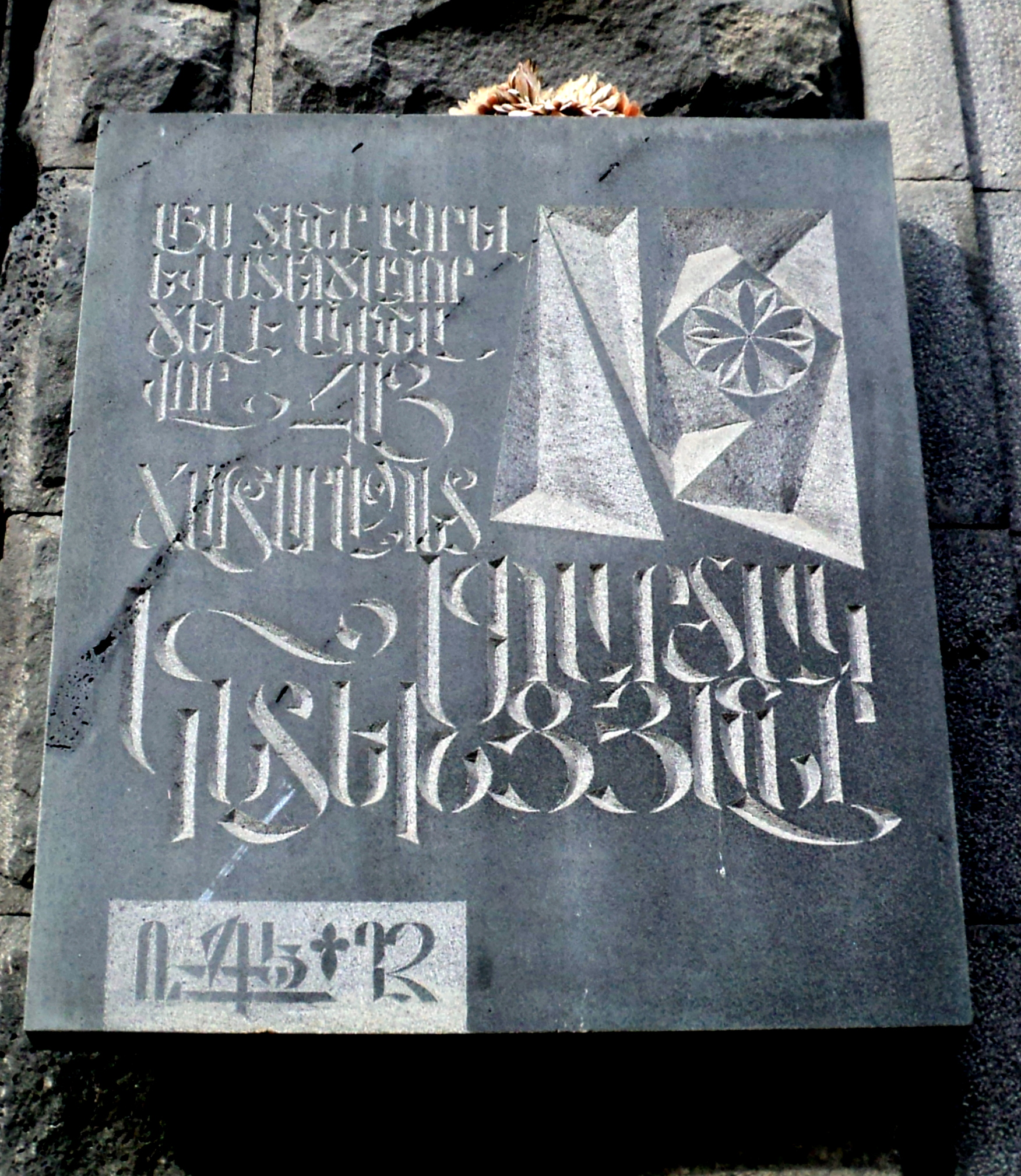 ՀՀ վաստակավոր ճարտարապետ 6/231